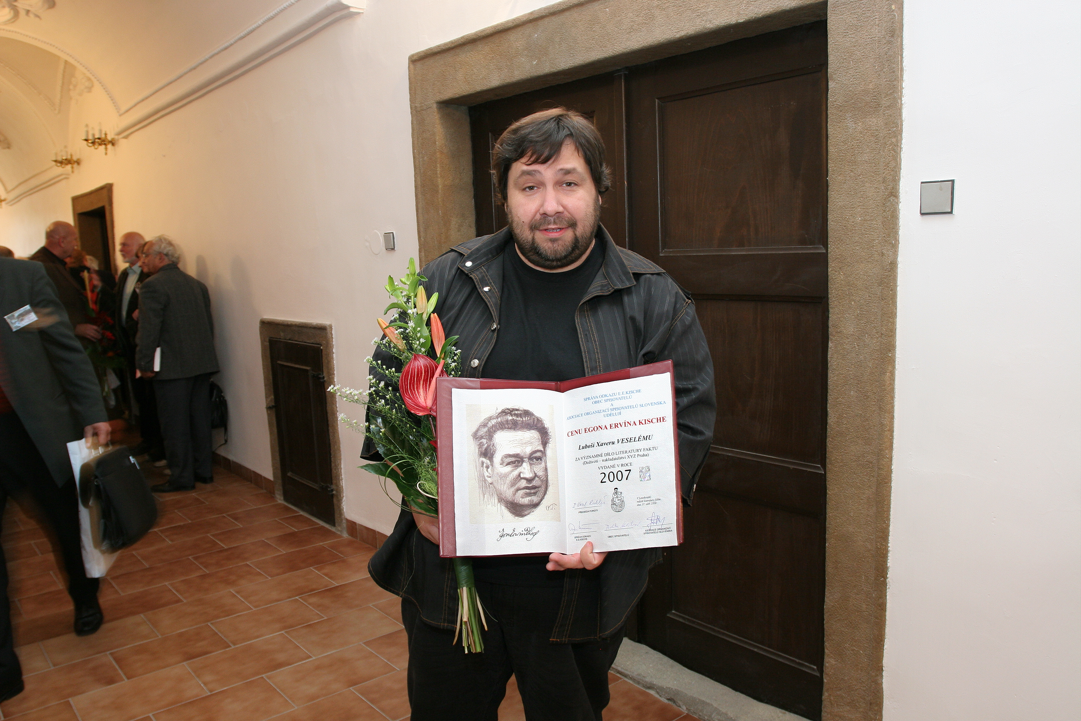 Luboš Xaver Veselý přebíra cenu Egona Ervína Kische